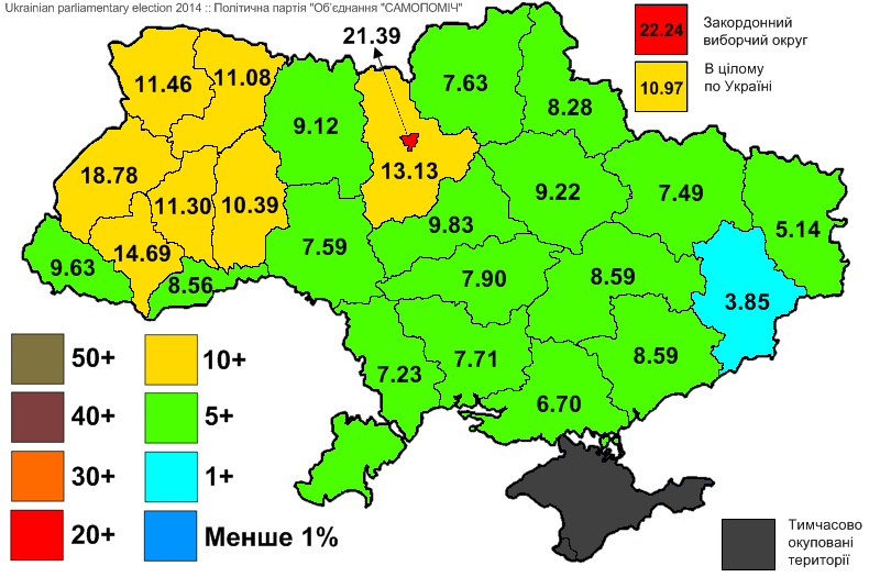 Результати виборів до Верховної Ради України, які відбулись 25 жовтня 2014 року. Інформація з офіційного сайту ЦВК. Політична партія "Об’єднання "САМОПОМІЧ".